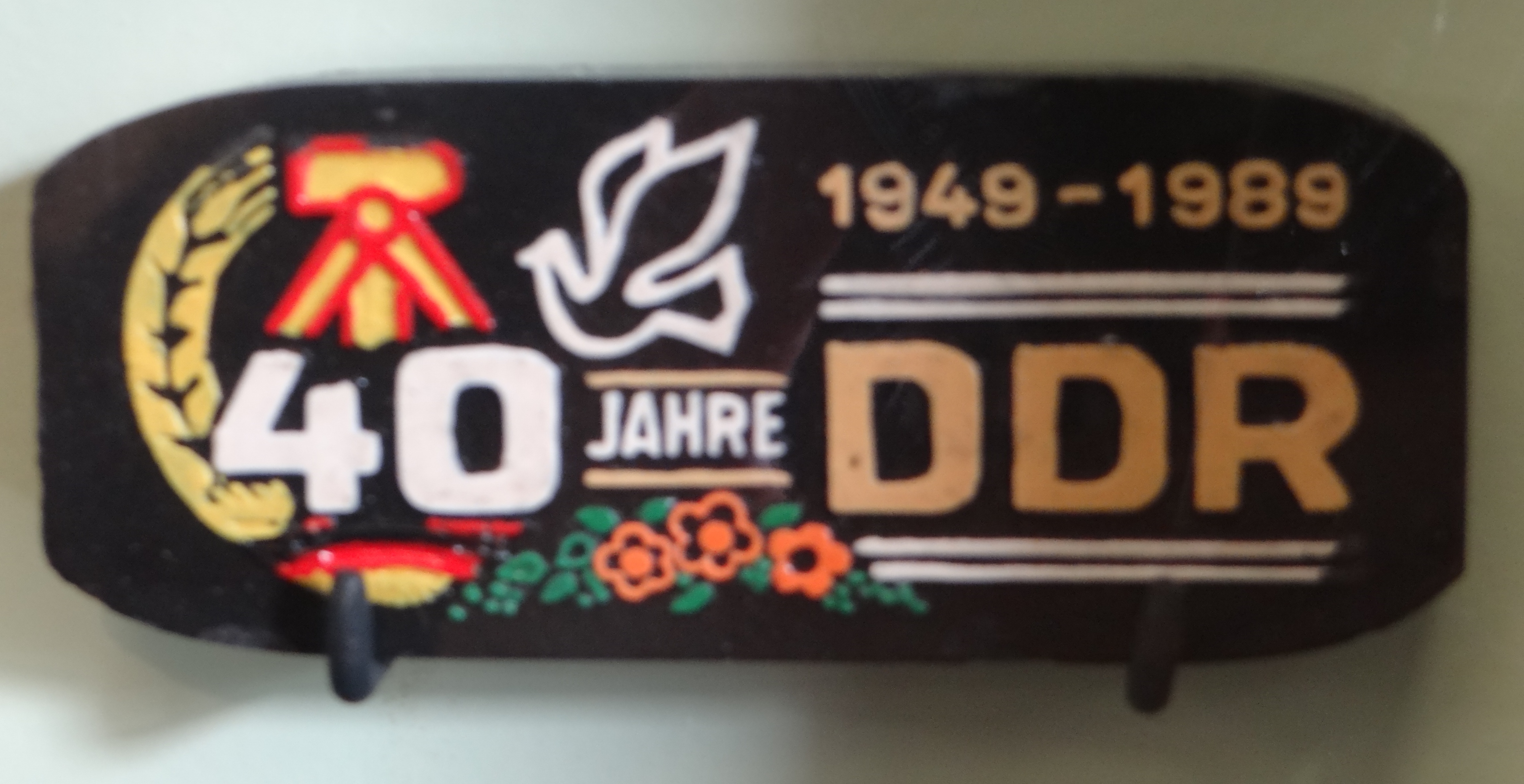 Deutsches Bergbau-Museum Bochum. Halle 19: Aufbereitung und Rohstoffveredlung. Kohlebrikettierung: Schmuckbriketts